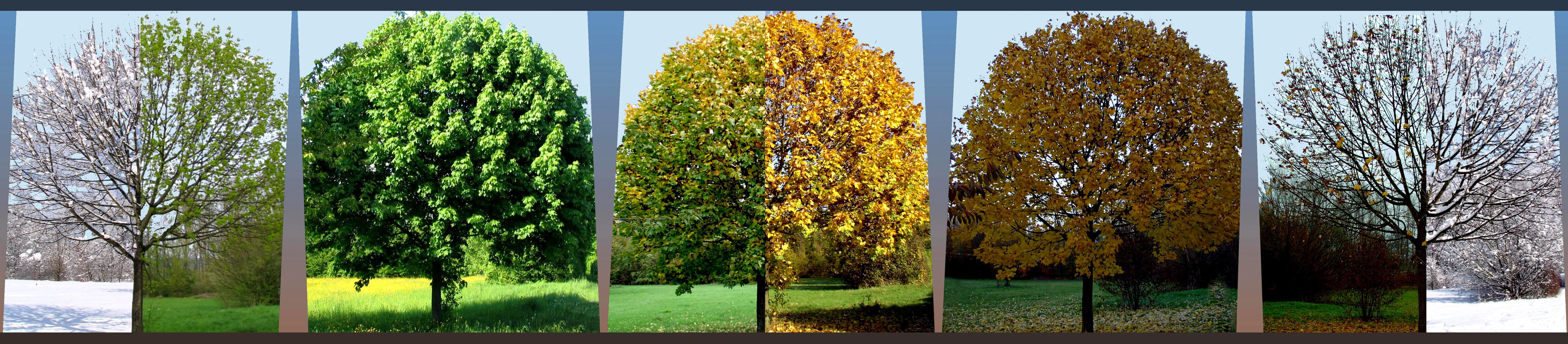 Ahorn im Wandel der Jahreszeiten